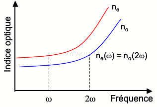 Description : Accord de phase par biréfringence dans le cas de la génénerescence. Source : Personnelle Licensing Catégorie:Schéma de physique